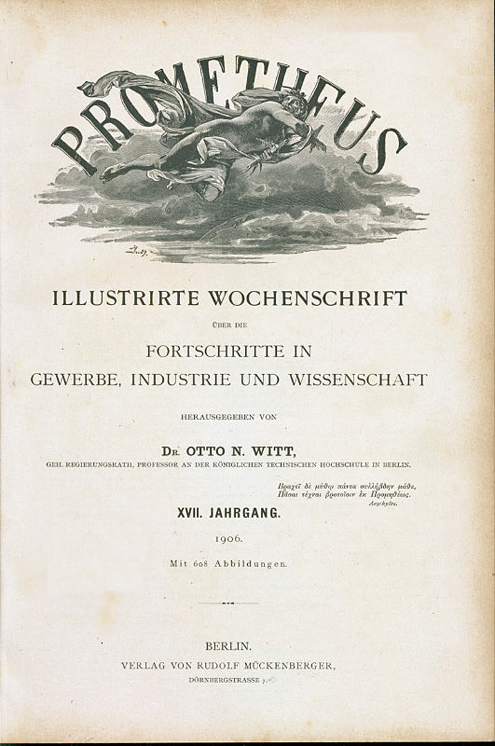 Prometheus XVII. Jahrgang 1906